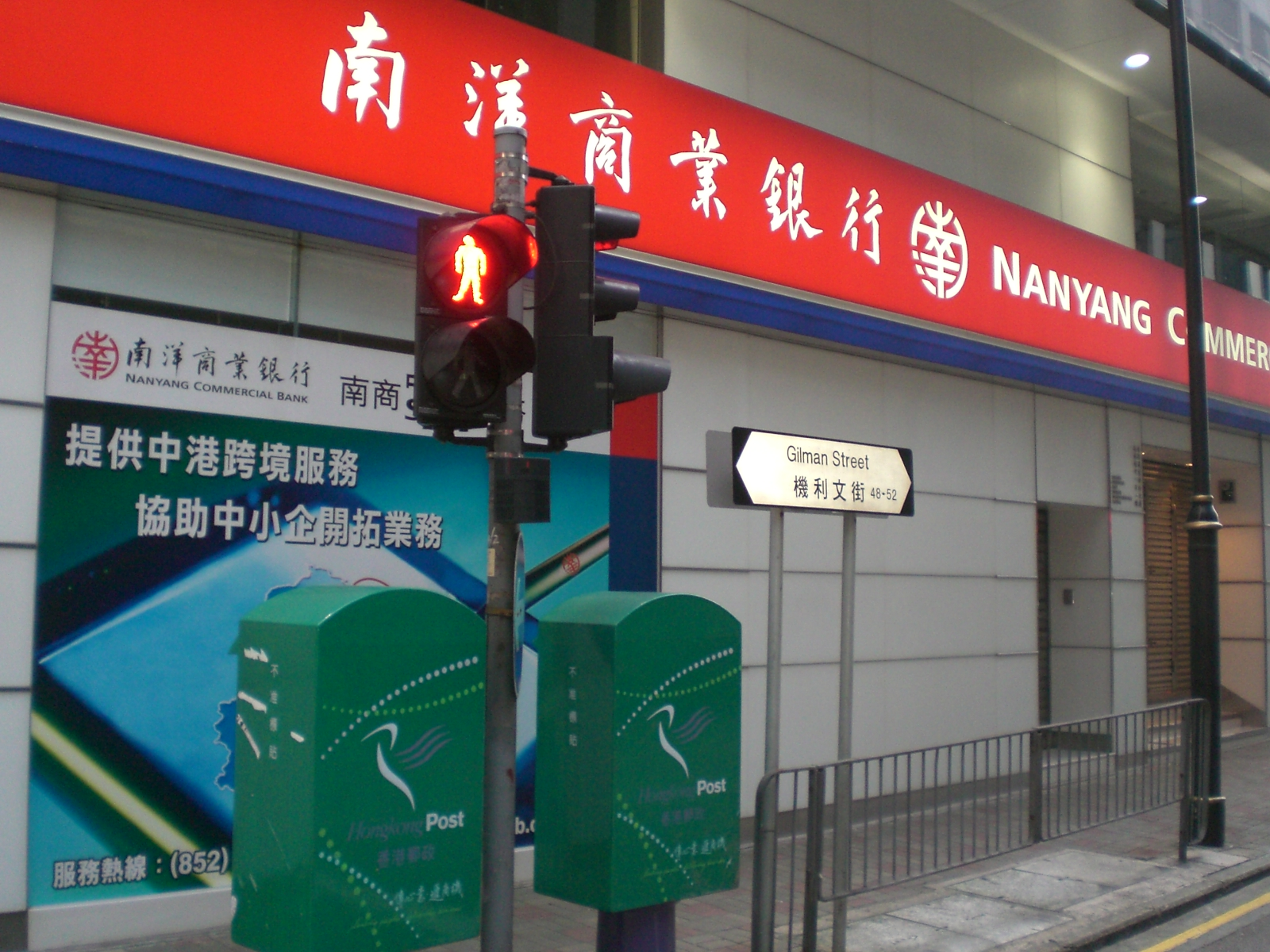 南洋商業銀行大廈, 機利文街, Gilman Street, Central, Hong Kong.